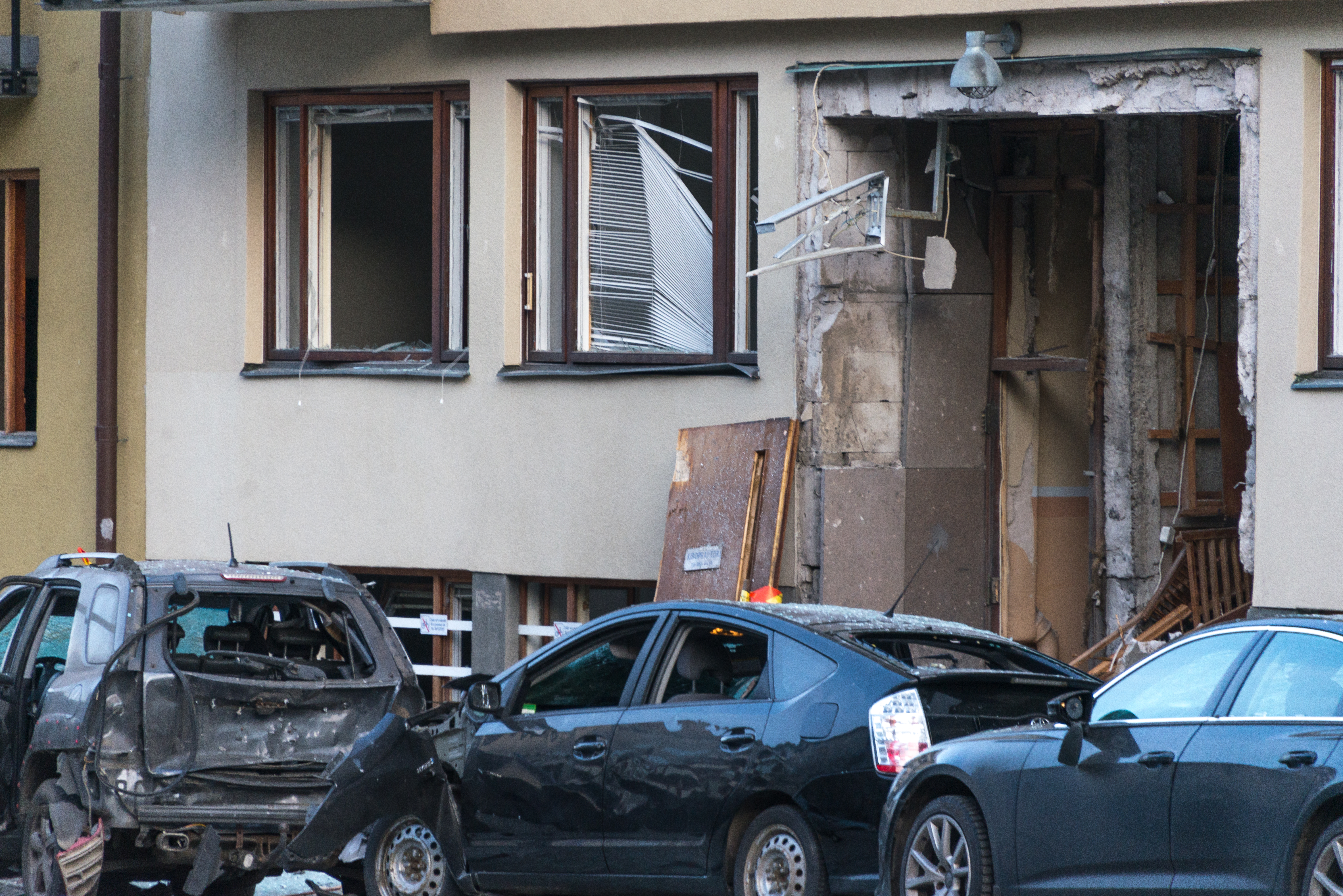 Den 13 januari 2020, på natten, detonerade Stockholms kraftigaste bomb, på Gyllenstiernsgatan mitt på fashionabla Östermalm. Några dar senare greps en misstänkt med kopplingar till narkotikaförsäljning på Östermalm.